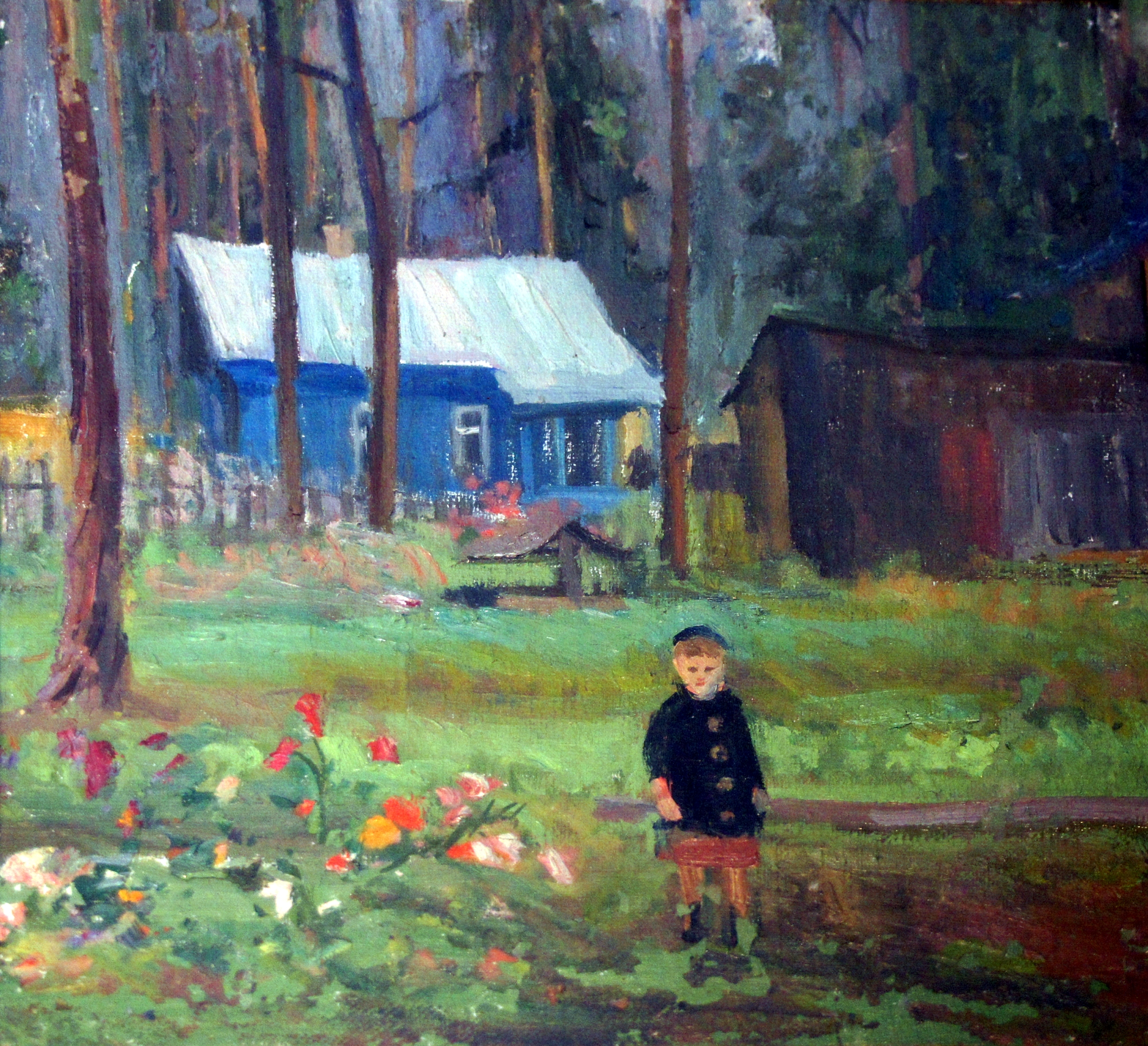 Дочь художника Светлана на даче в Болшево (Старые горки), 1939